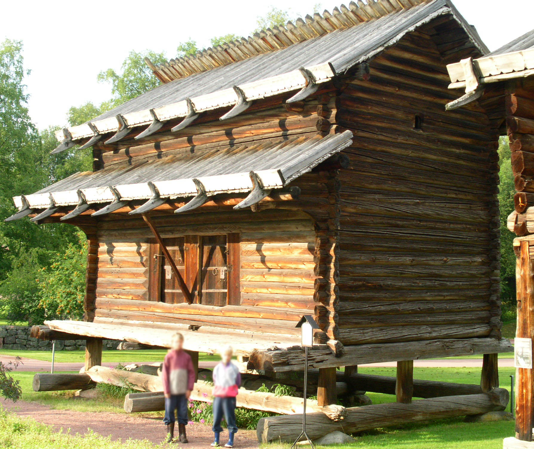 Kyrkhärbret i Älvdalen, en av Sveriges äldsta bevarade timmerbyggnader